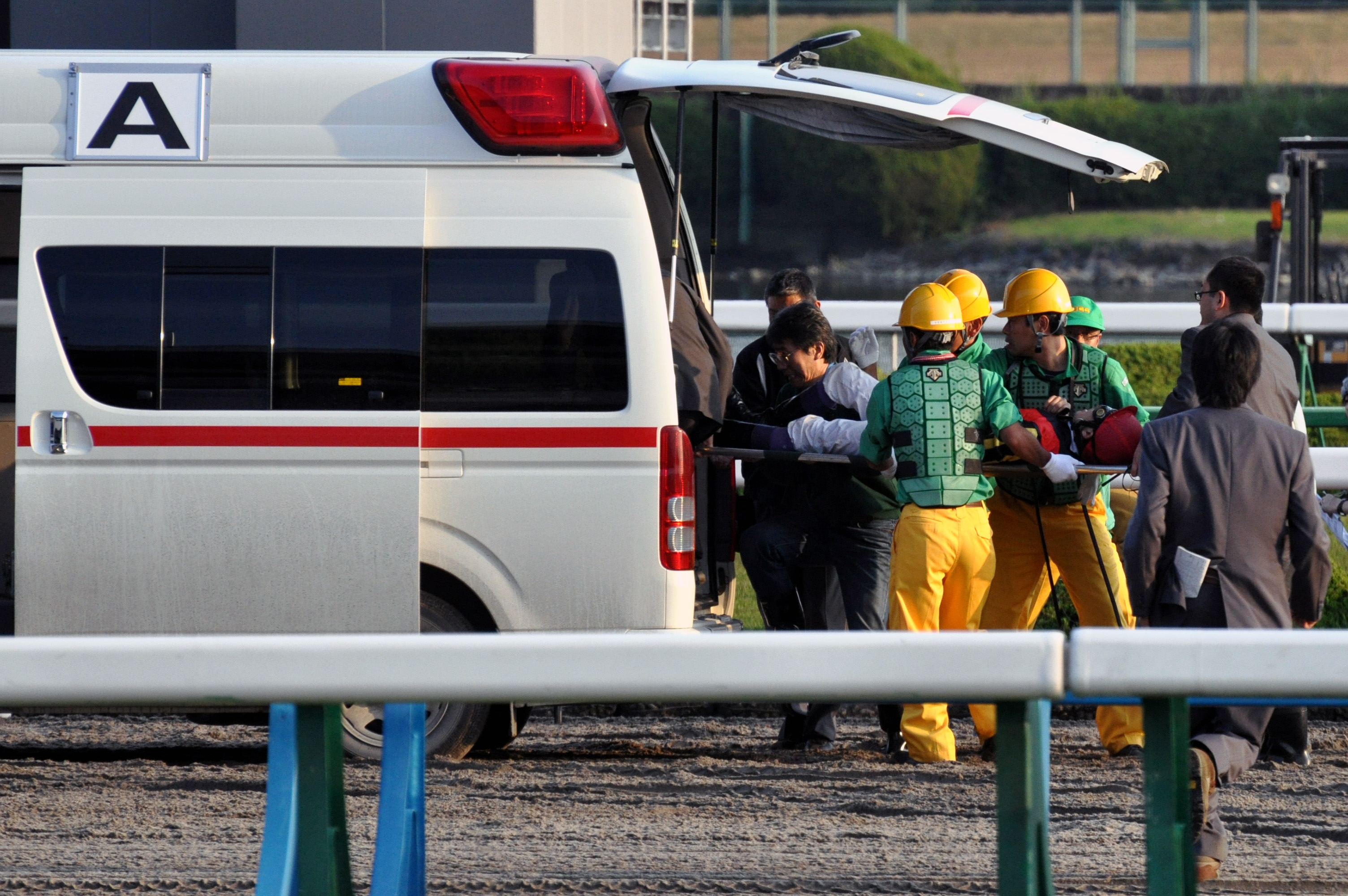 エリザベス女王杯で落馬し救急車に搬送される武豊 （2008年11月16日）